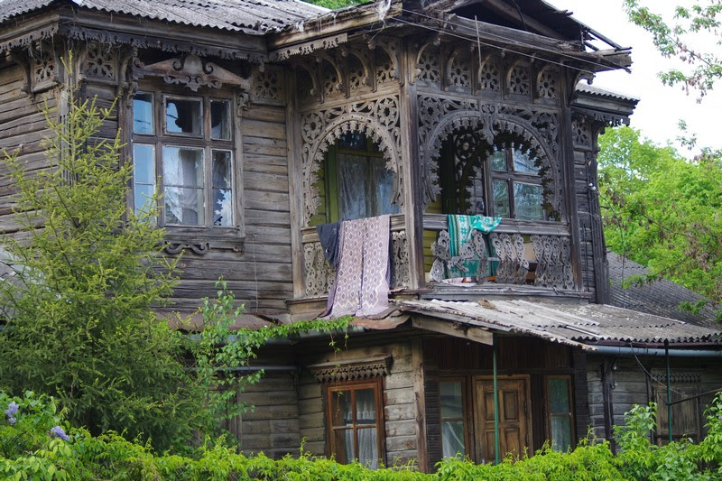 medinis namas Polocko gatvėje